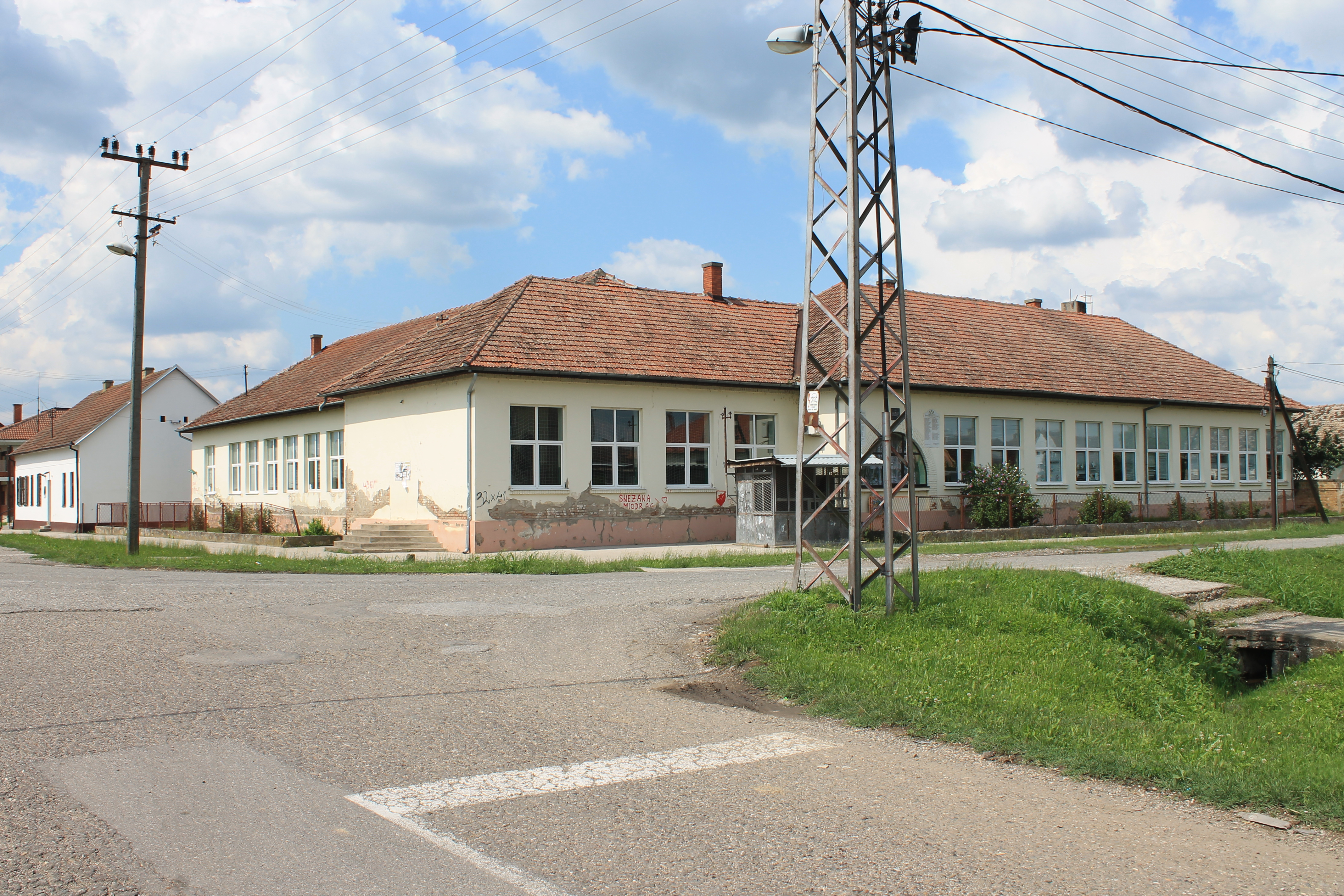 Vašica